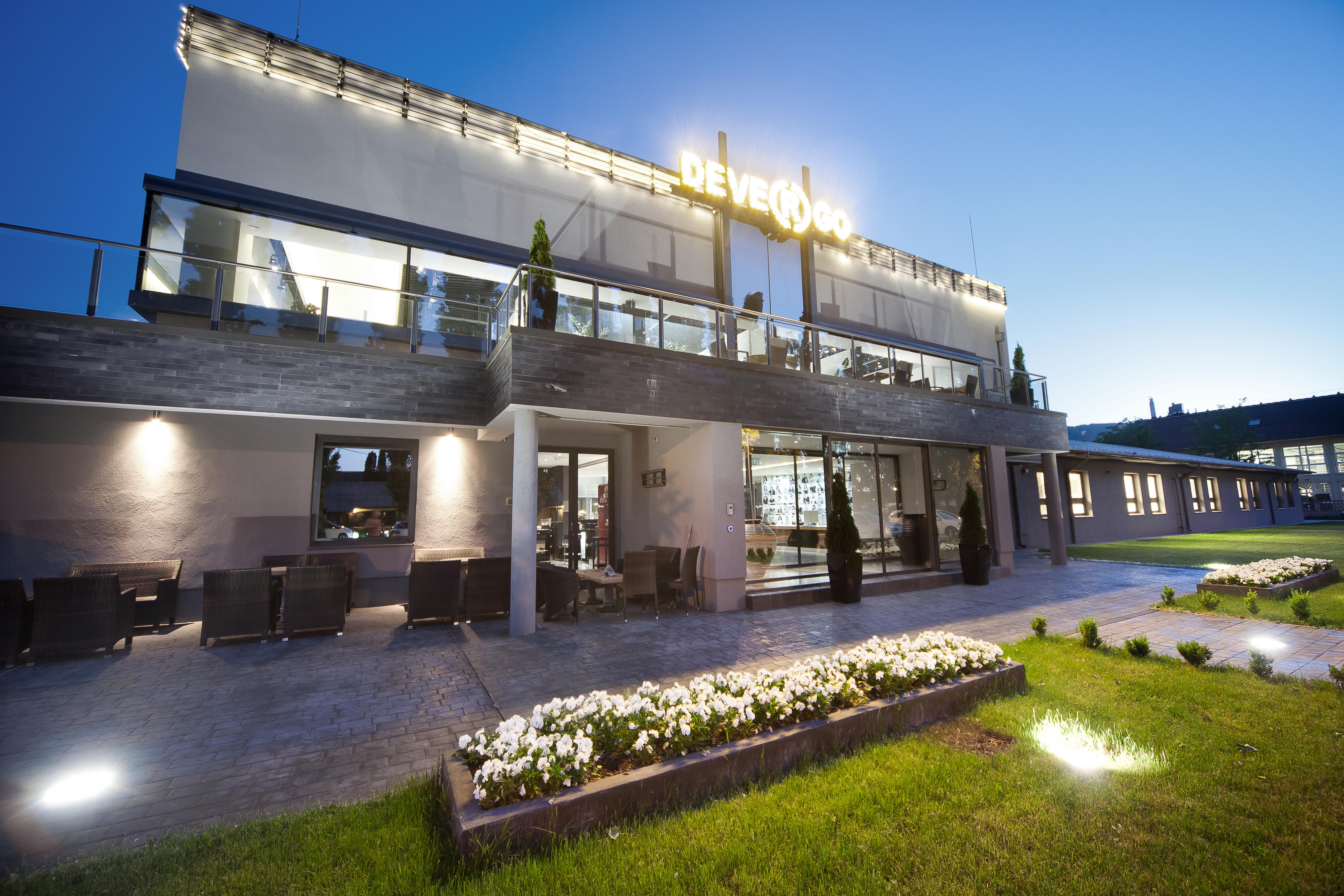 Devergo magyarországi központja. Devergo & friends, Ruházati bolt, Budapest, III. Csikós u. 6